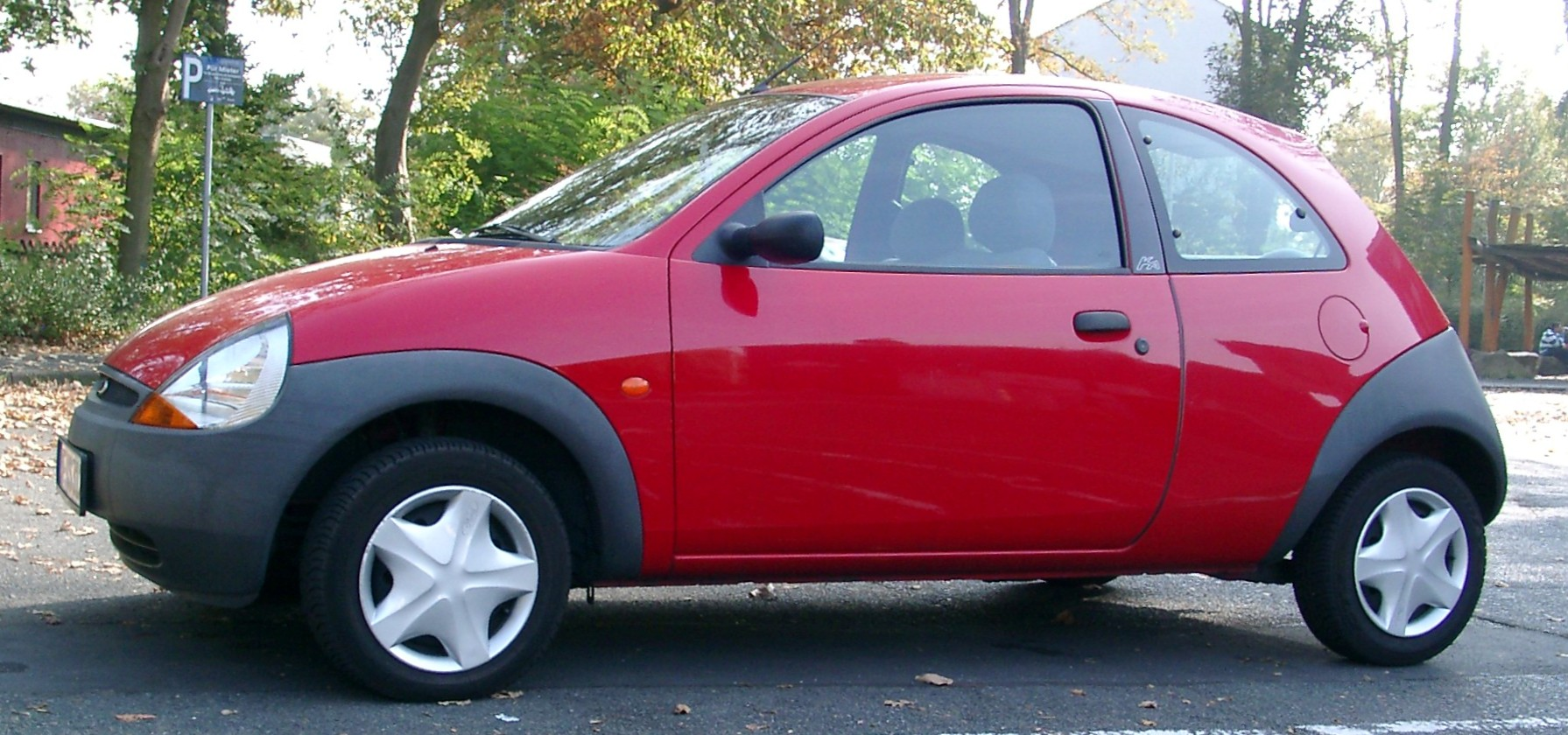 Ford Ka